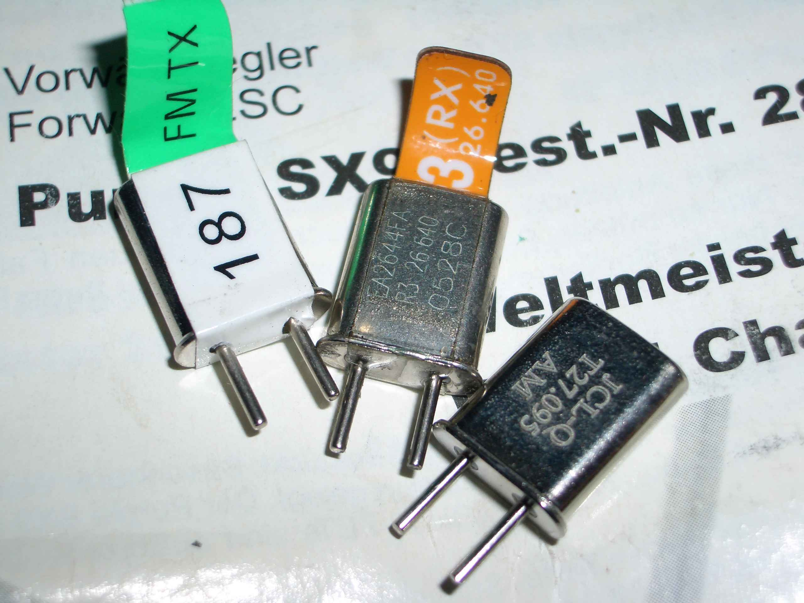 Кварцы для радиомоделей